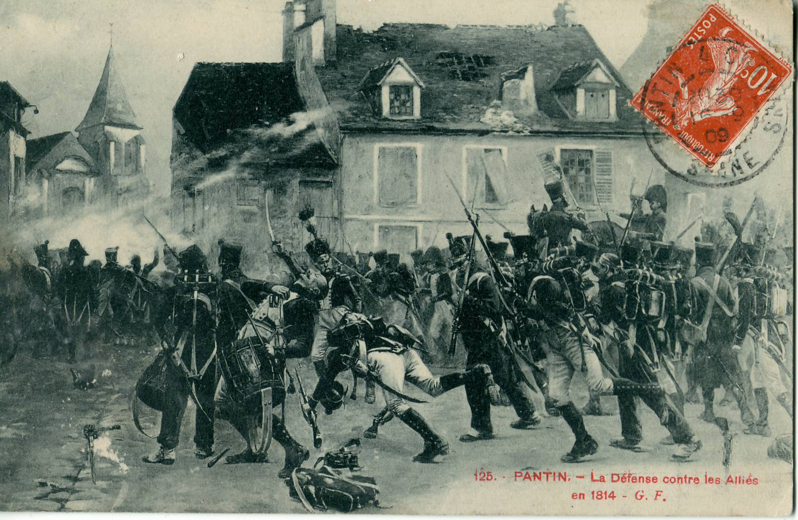 Carte postale ancienne éditée par GF N° 125PANTIN : La défense contre les alliés en 1814.La source de cette illustration n'est pas mentionnée